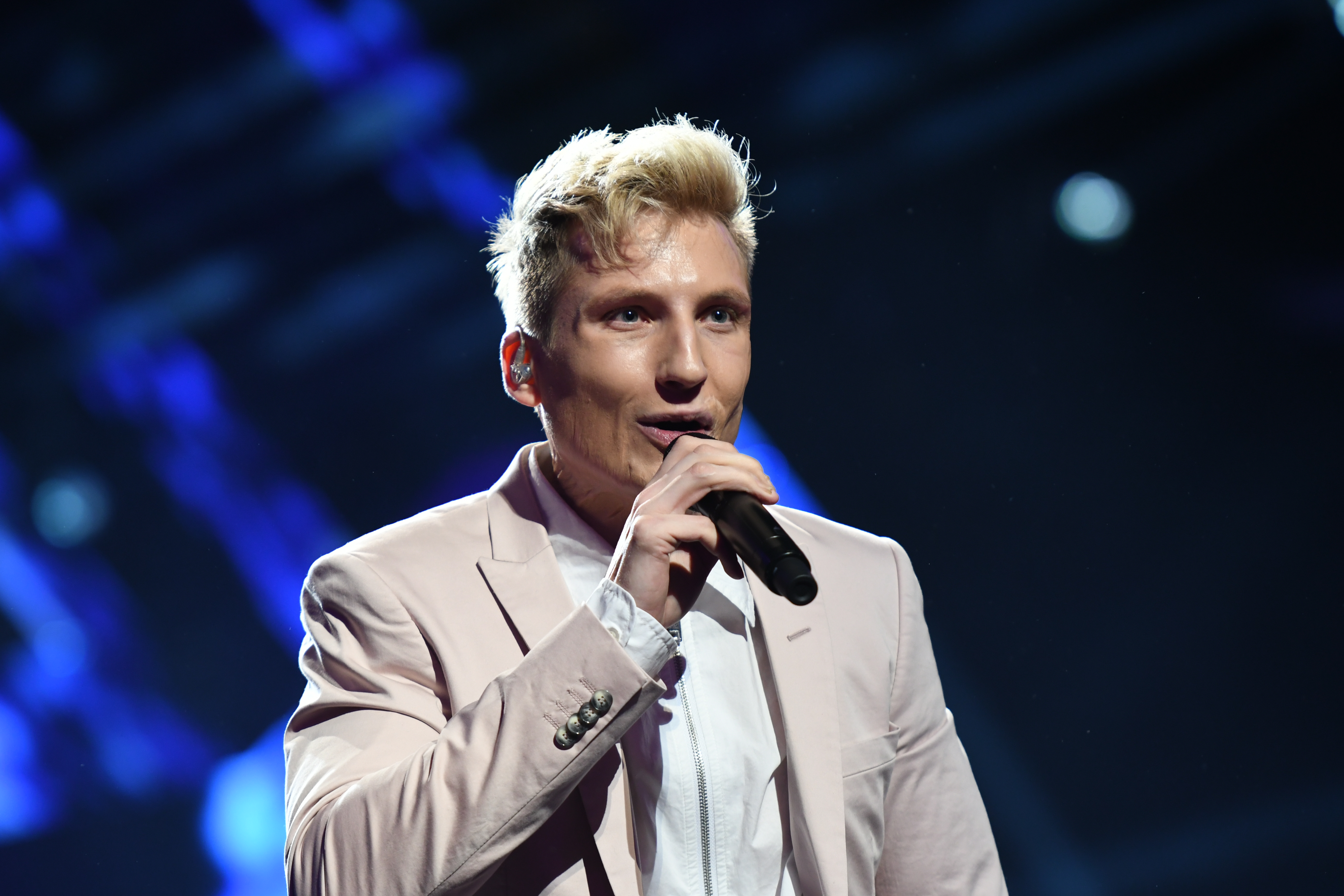 Axel Schylström på repetitioner till andra chansen.